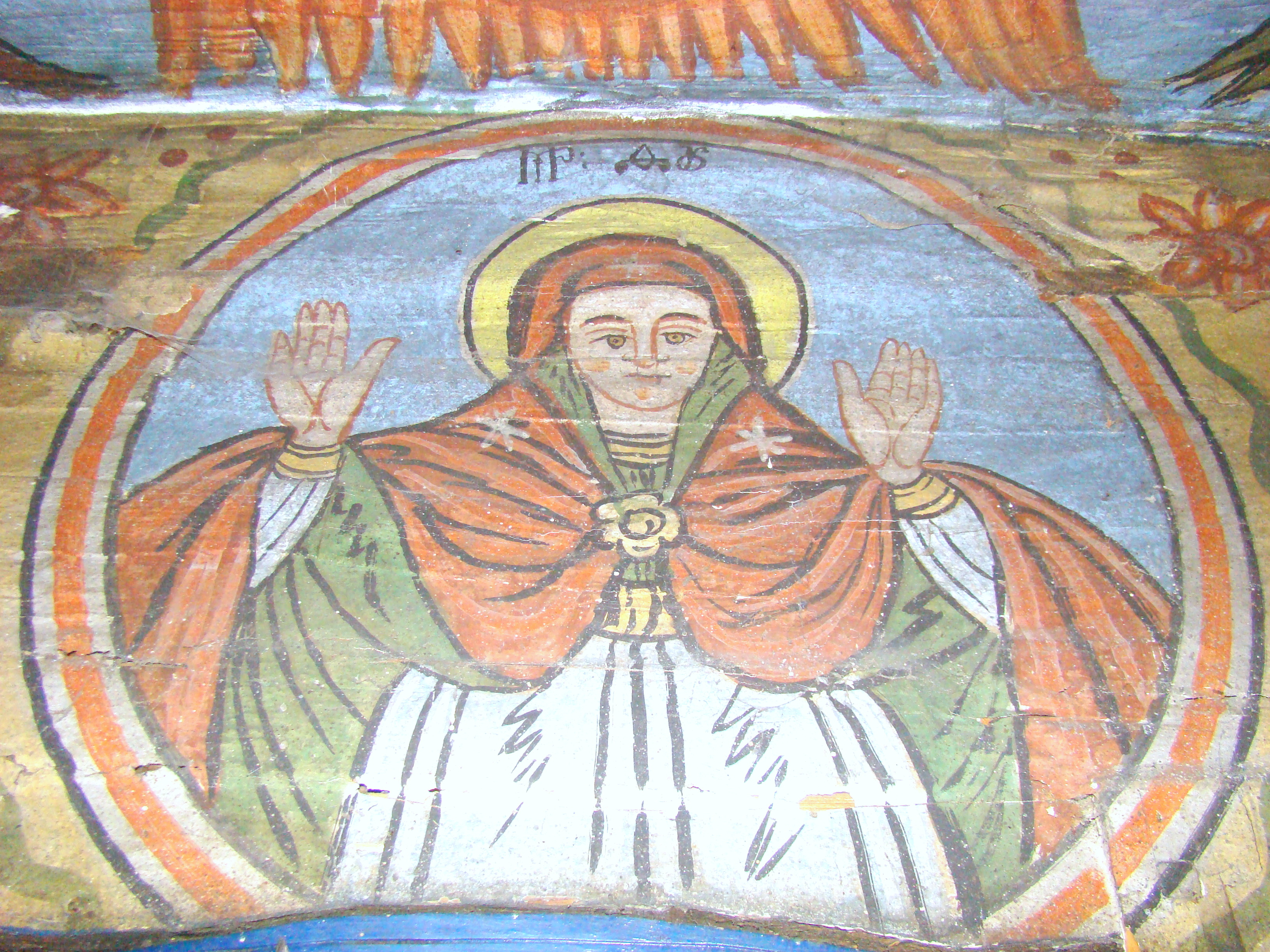 Biserica de lemn din Runc, județul Alba